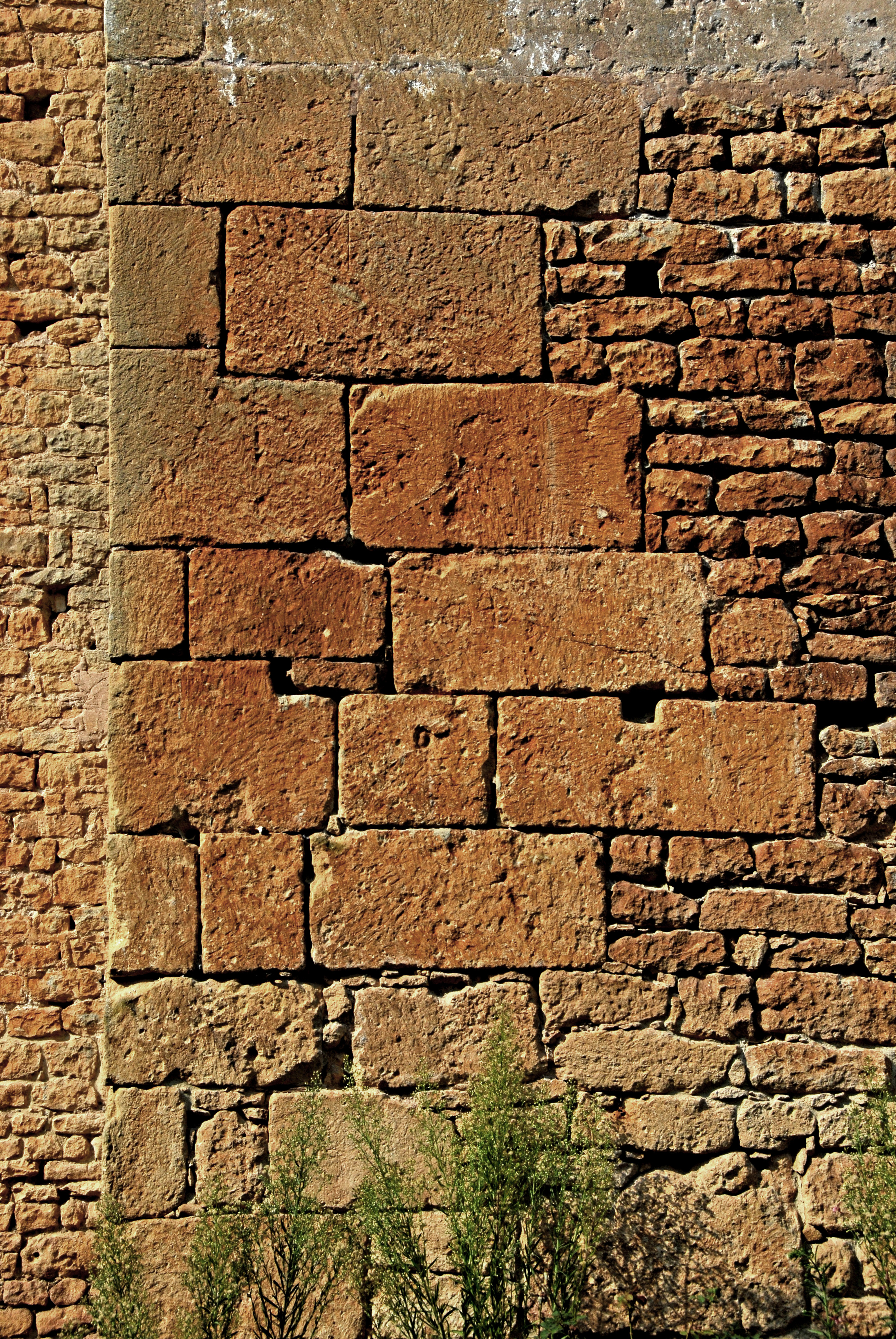 Saint-Léon-sur-Vésère, Gebäudeecke, Blocksteine